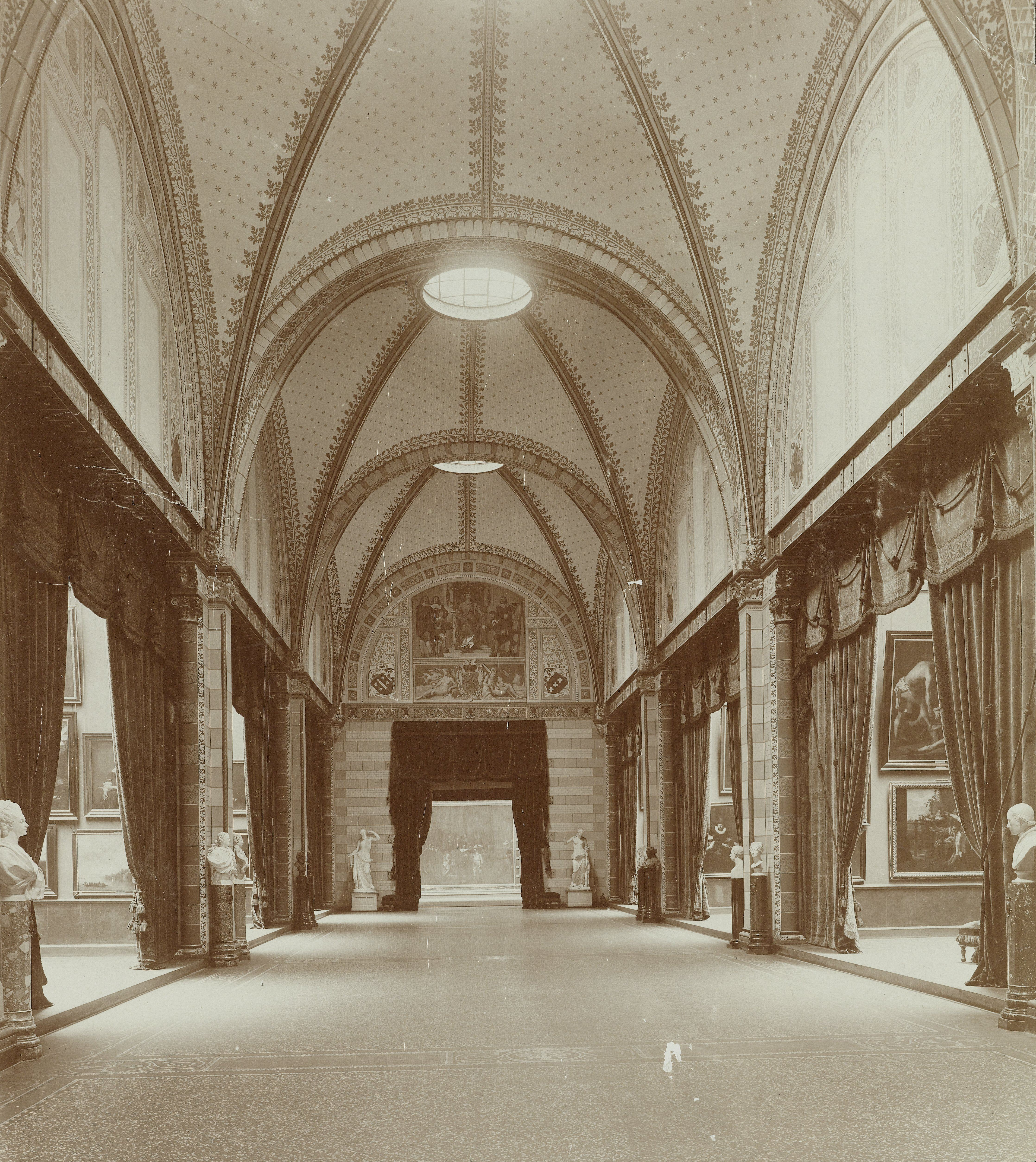 RMA-SSA-F-00047-1 De eregalerij met aan het eind de nachtwachtzaal. op deze foto ontbreken nog de decoratieve schilderingen, die vanaf 1900 de vakken boven de kabinetten sierden. In de kabinetten hingen 17de-eeuwse schilderijen. Eregalerij met aangrenzende kabinetten, gezien naar het zuiden. Het decoratiepatroon zoals ontworpen door Cuypers is hier nog niet volledig uitgewerkt. De schilderingen van Georg Sturm zijn nog niet aangebracht in de boogvelden boven de kabinetten. De open sluitstenen van de gewelven 'doen een spaarzaam licht binnenvallen, zoodat de verlichting der vier aan elke zijde der galerij zich bevindende laterale zalen en der Rembrandtzaal krachtiger schijnt' (De Stuers p.34) Cuypers gebruikte voor de constructie een combinatie van stenen gewelven en kolommen met smeedijzeren balken. Bij de decoratie van de balken, samensteld uit getrokken en gesmeed ijzer, is de constructie als uitgangspunt genomen. 'Flenzen en klinknagels' maken onderdeel uit van het decoratiepatroon. Granito vloer met mozaïek, voor patroon zie De Stuers afb. 12 fig B. Het niveauverschil tussen de galerij en de kabinetten wordt in 1925 geëgaliseerd.